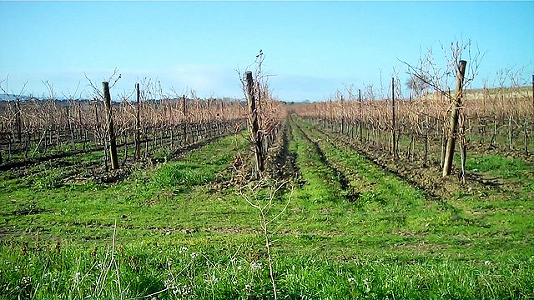 Vignoble de l'AOC Minervois-la-livinière